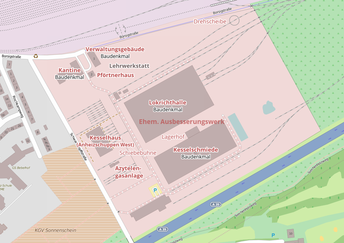 Plan des Ausbesserungswerkes (Bundesbahnausbesserungswerk, Reichsbahnausbesserungswerk) in Braunschweig mit seinen Gebäuden, 2014.